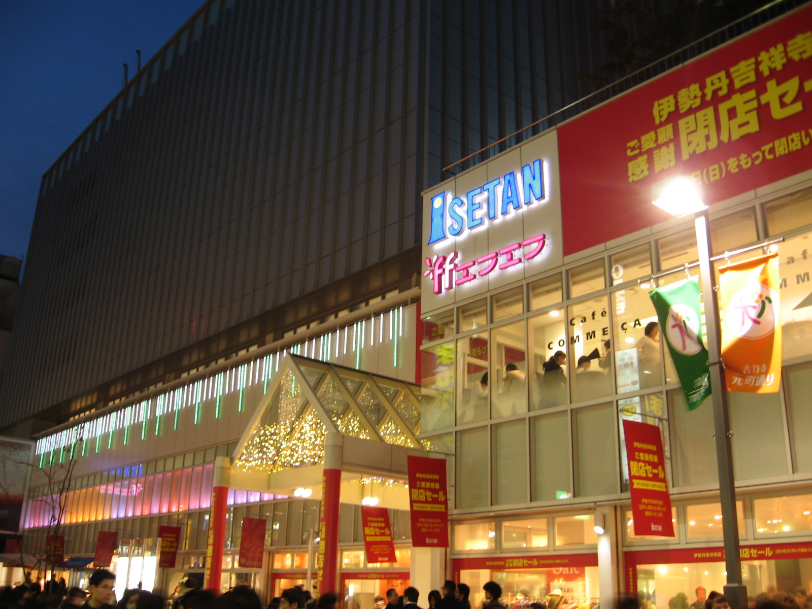 東京都武蔵野市吉祥寺にあるエフエフショッピングセンタービル。